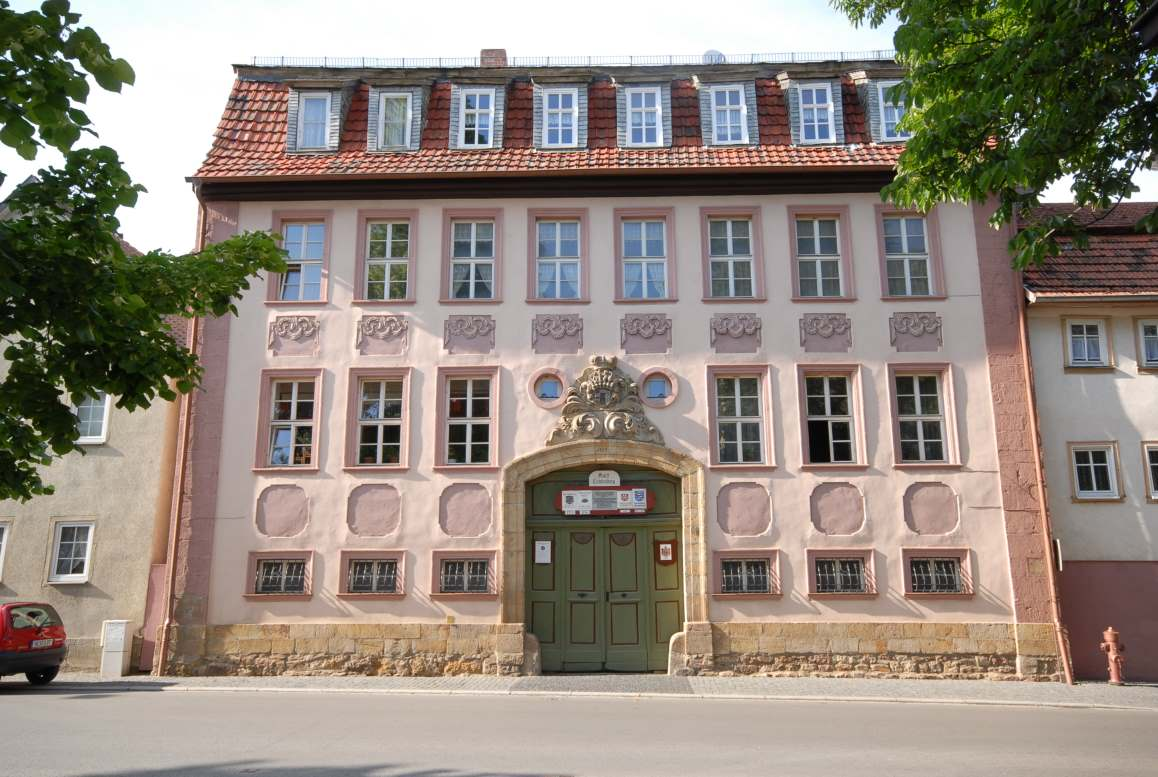 Ostheim v.d.Rhön / Altes Amtshaus Lichtenberg